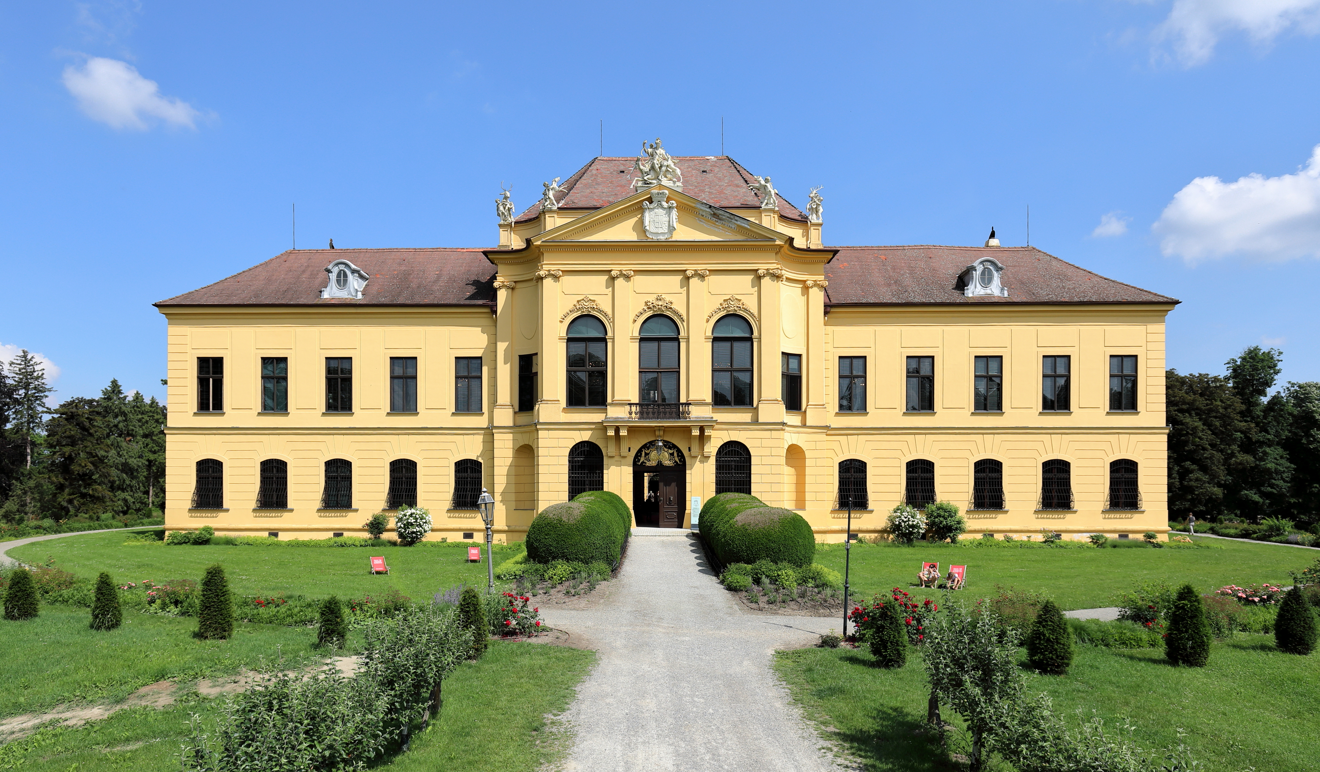 Südwestansicht des Schlosses Eckartsau in der niederösterreichischen Marktgemeinde Eckartsau.Ursprünglich war das vierflügelige Jagdschloss eine mittelalterliche Wasserburg. Von 1722 bis 1732 erfolgte ein Umbau der Anlage; unter anderem wurde dabei der Westtrakt neu errichtet. Nach Überschwemmungen Ende das 18. Jahrhundert wurde wegen Setzungen des Baus der Ostflügel zur Gänze abgetragen und der Südflügel teilweise. 1897/98 fand ein Wiederaufbau statt und dabei erhielt das Schloss im Wesentlichen sein heutiges Aussehen.